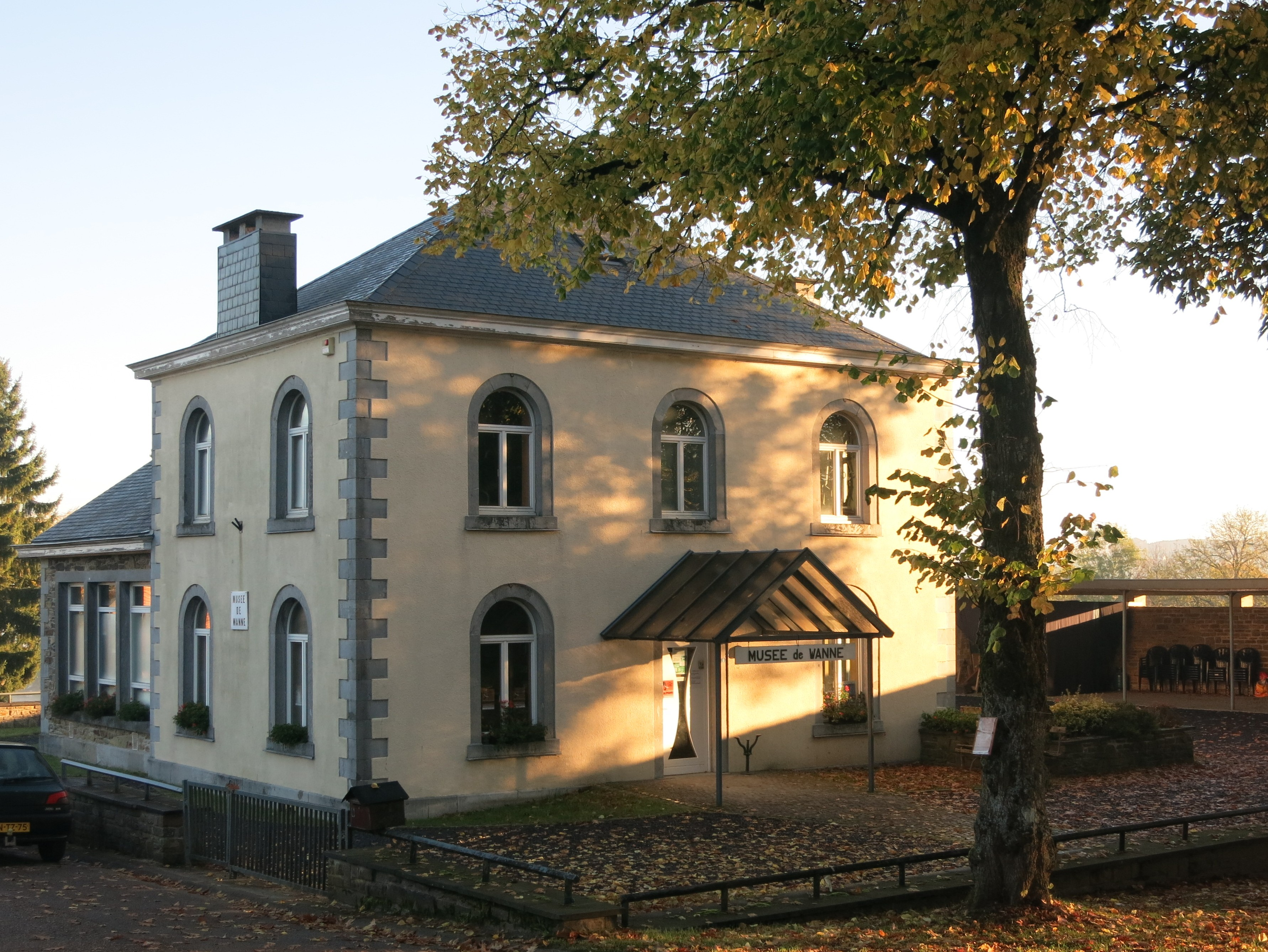 Musée de Wanne: Le Musée vivant du temps qui passe